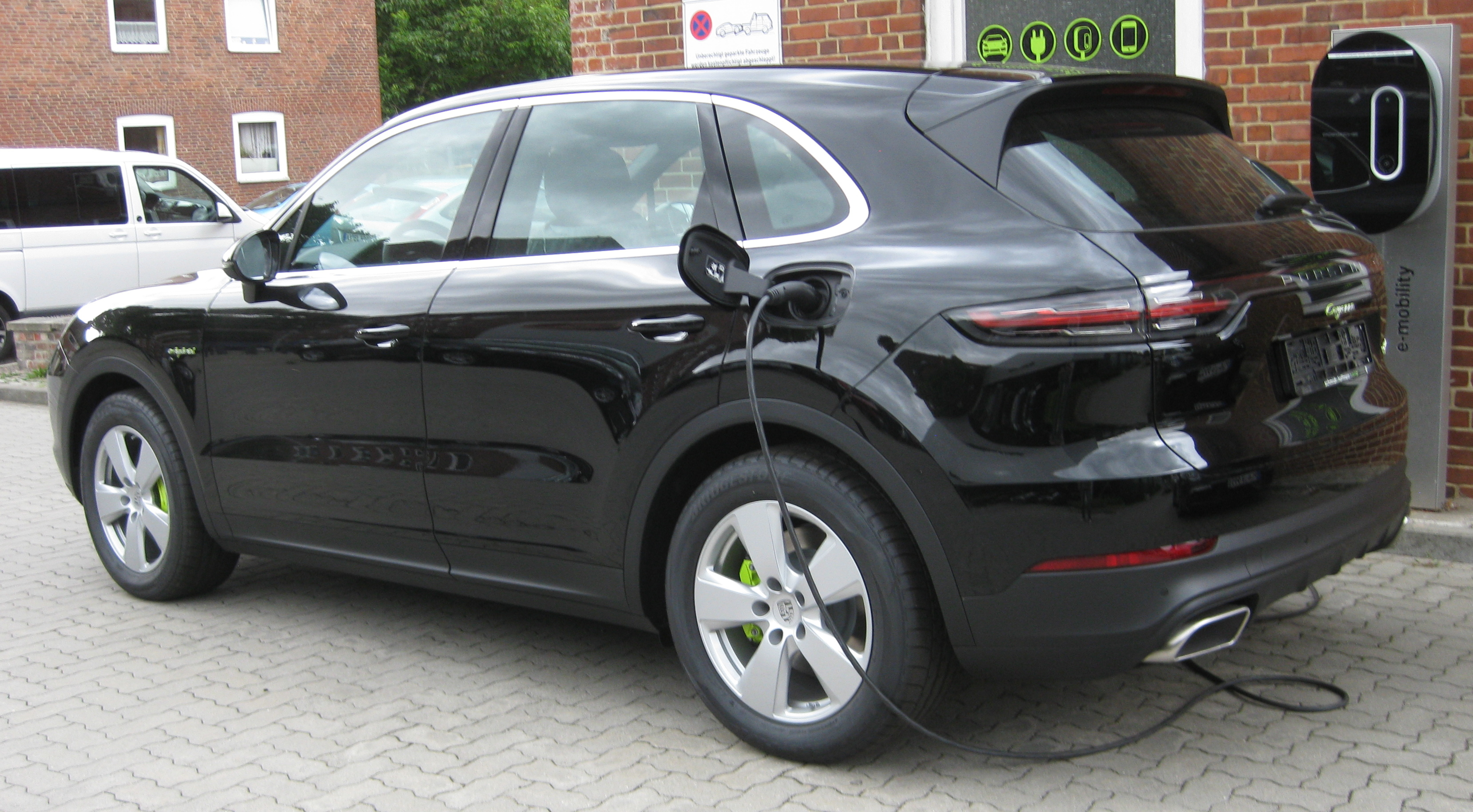 Porsche Cayenne E-Hybrid Ladestation